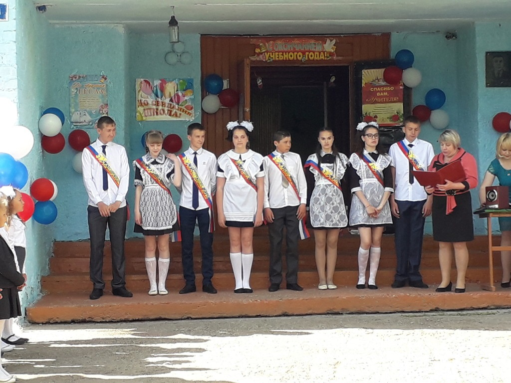 Выпускники Крестниковской СШ